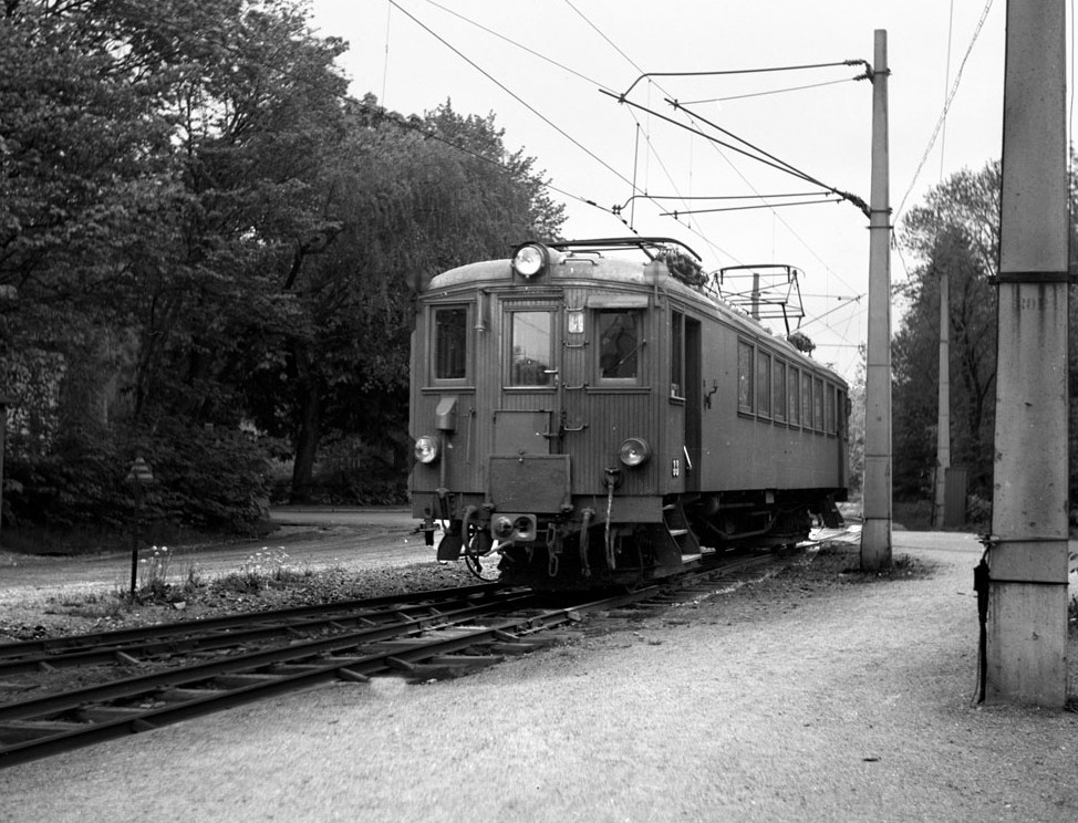 Elmotorvagnen som trafikerade Stocksund-Långängstorp, den s.k. "Lådan", vid Stocksunds station året innan nedläggningen.